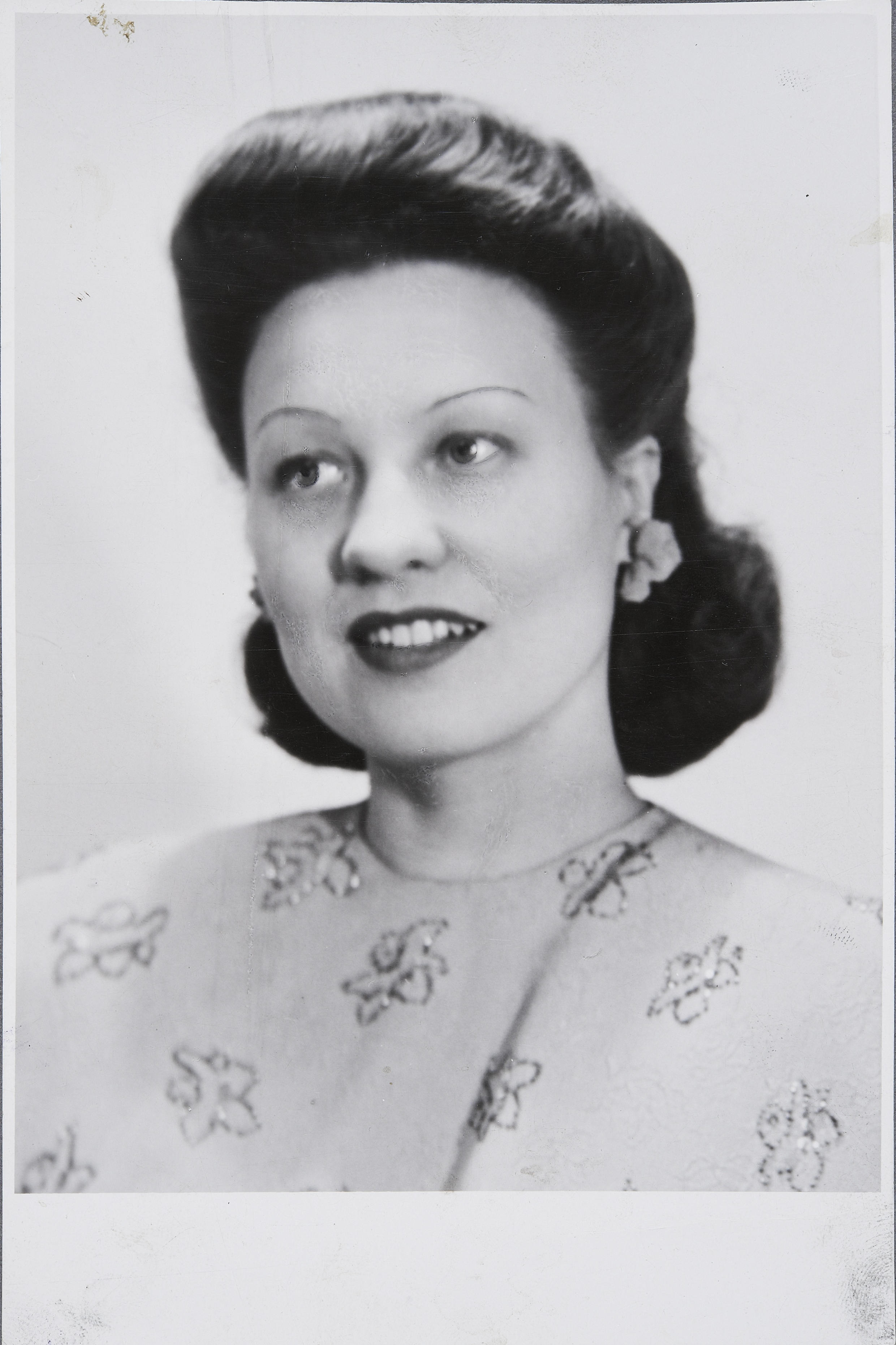 oopperalaulajatar Elli Pihlaja; pysty, mustavalkoinen, kiinnitetty kartongille, jonka koko 33 x 22 cm